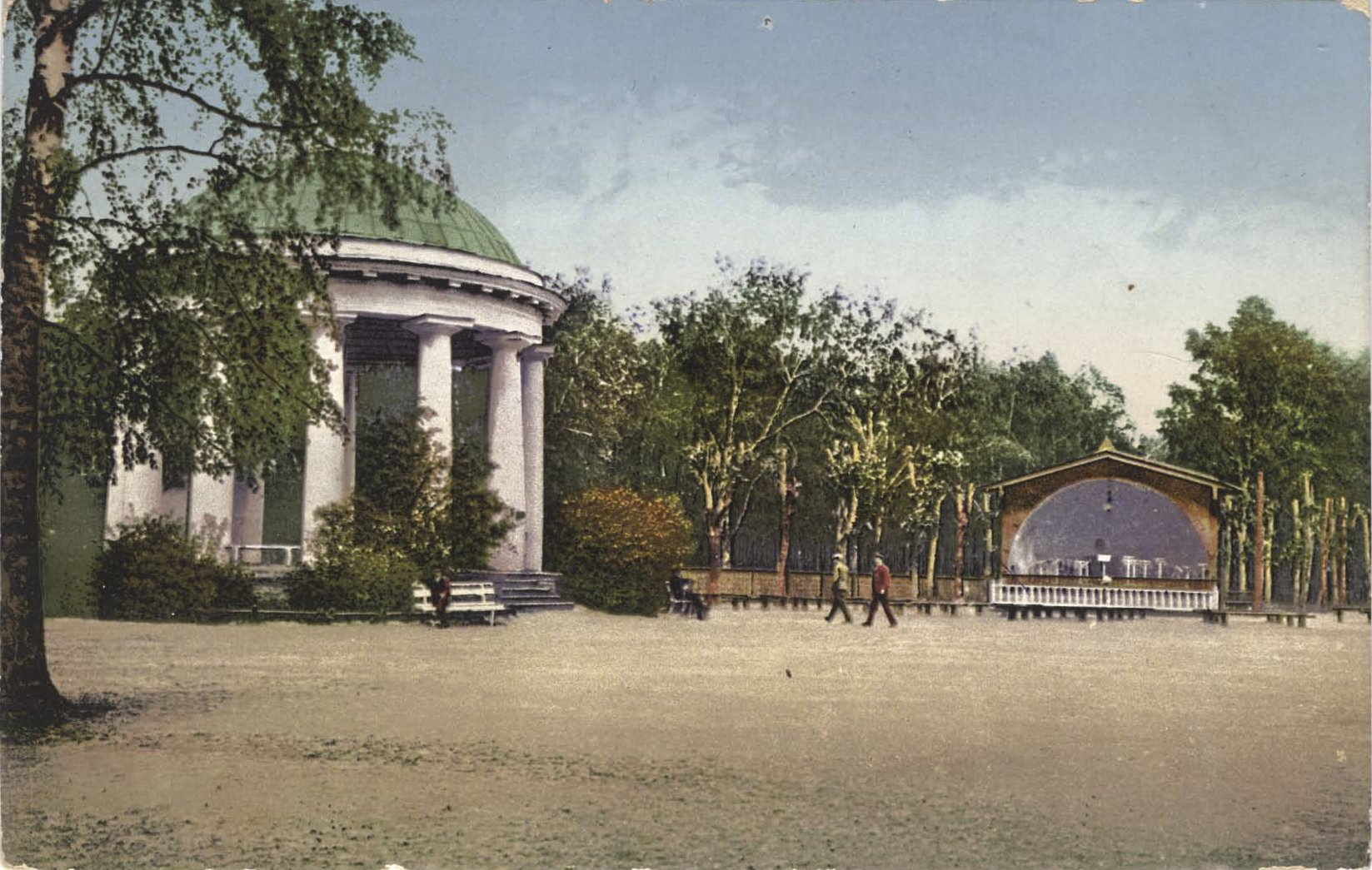 Сад общественного собрания. Пермь. Цветная открытка